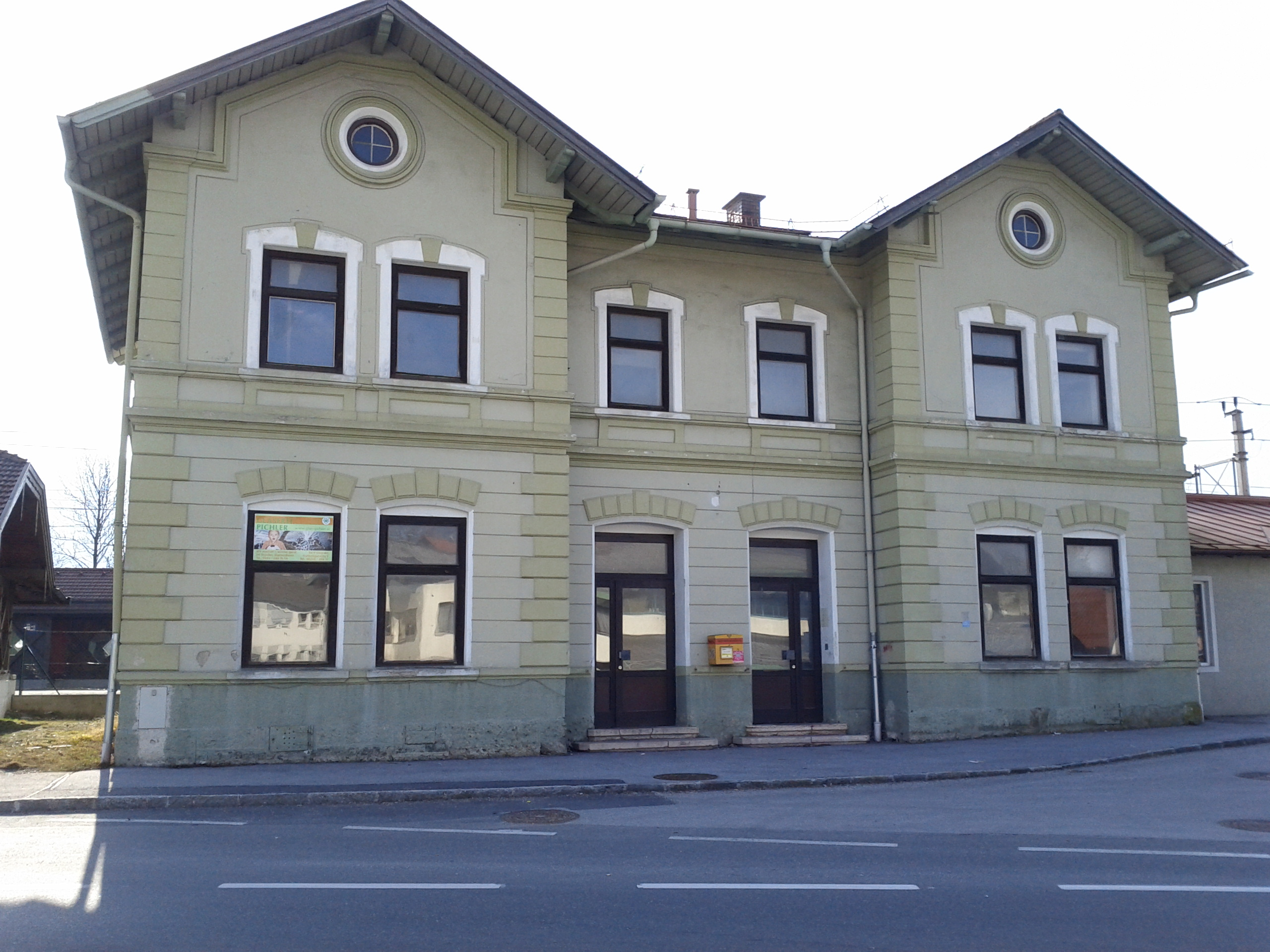 Bahnhof Puch-Oberalm, Aufnahmsgebäude - Puch bei Hallein